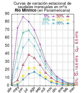 Curvas de variación estacional del río Miminco en Panamericana. # Dirección General de Aguas # Diagnóstico y clasificación de los cursos y cuerpos de agua según objetivos de calidad. Cuenca del río Biobío. # Santiago de Chile # Ministerio de Obras Públicas (Chile) # 2004 # url: # urlarchivo: # Tabla 4.16: Estación Mininco en Panamericana pág 88 mes 5% 10% 20% 50% 85% 95% abr 7.60 5.82 4.26 2.48 1.46 1.16 may 72.66 42.08 22.05 7.08 2.60 1.91 jun 86.81 66.57 48.26 26.10 12.24 7.85 jul 80.53 69.71 57.90 39.08 22.18 15.11 ago 69.99 60.01 49.80 34.87 22.48 17.37 sep 52.17 44.78 37.23 26.15 16.92 13.10 oct 30.97 26.90 22.68 16.36 10.95 8.64 nov 19.64 16.96 14.17 9.96 6.22 4.52 dic 11.77 10.16 8.48 5.95 3.69 2.67 ene 7.45 6.34 5.21 3.58 2.25 1.72 feb 3.60 3.23 2.84 2.21 1.62 1.36 mar 3.19 2.84 2.48 1.93 1.45 1.23 This plot was created with Gnuplot.